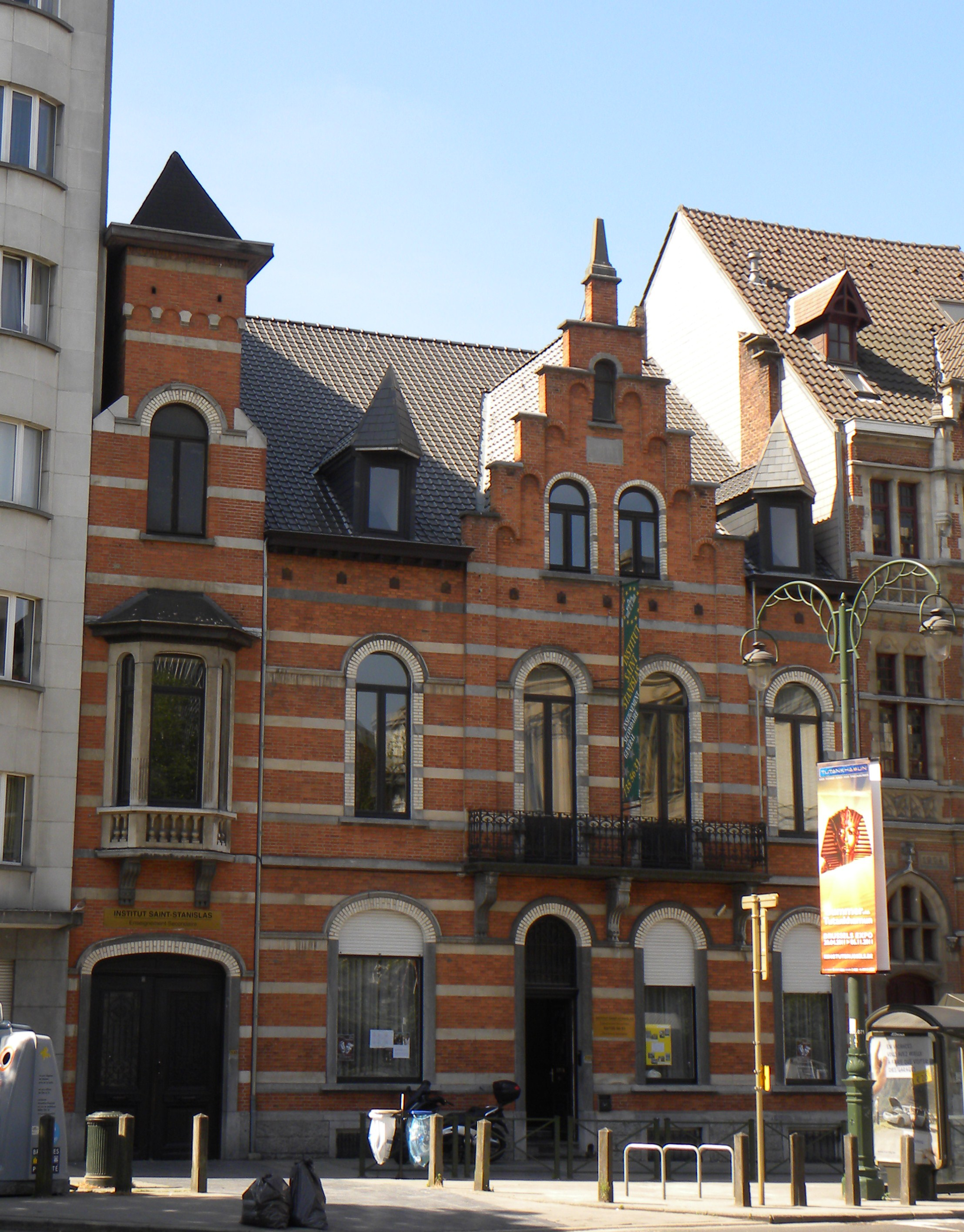 Façade de l'Institut Saint Stanislas Bruxelles, 131 avenue des Nerviens. Construction date circa 1903